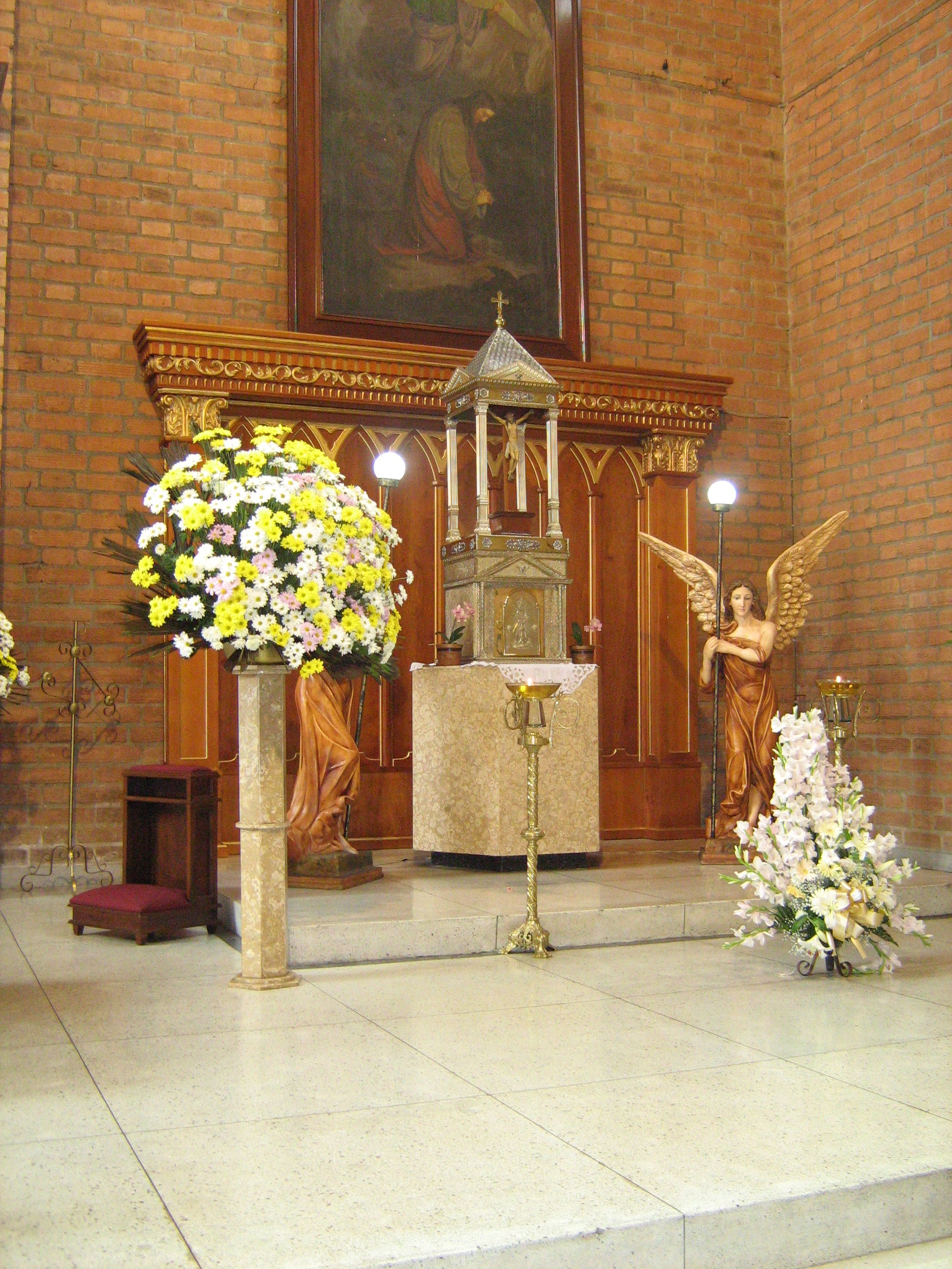 iglesia San José en Envigado. Antioquia. Colombia